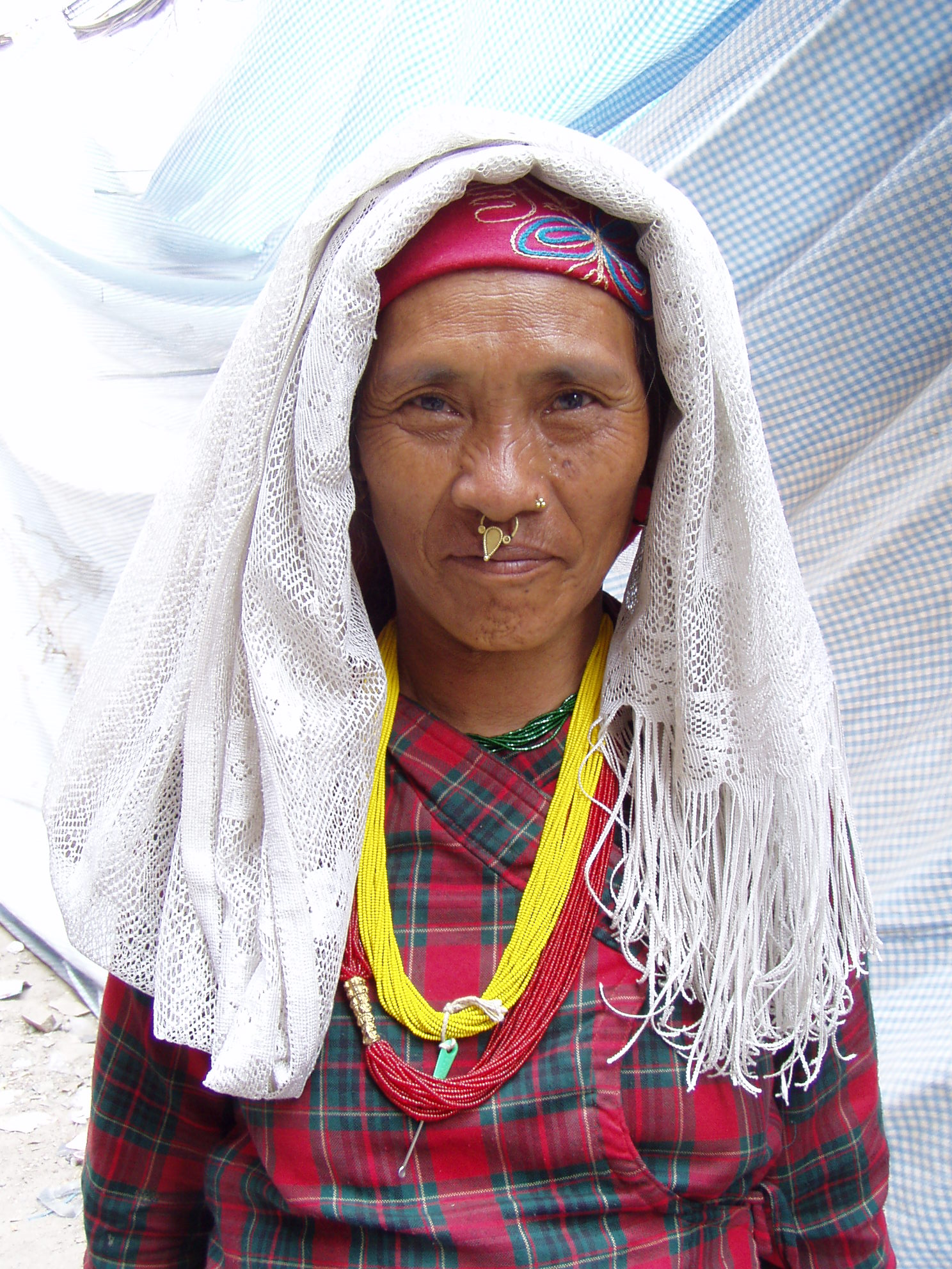 Nepali woman